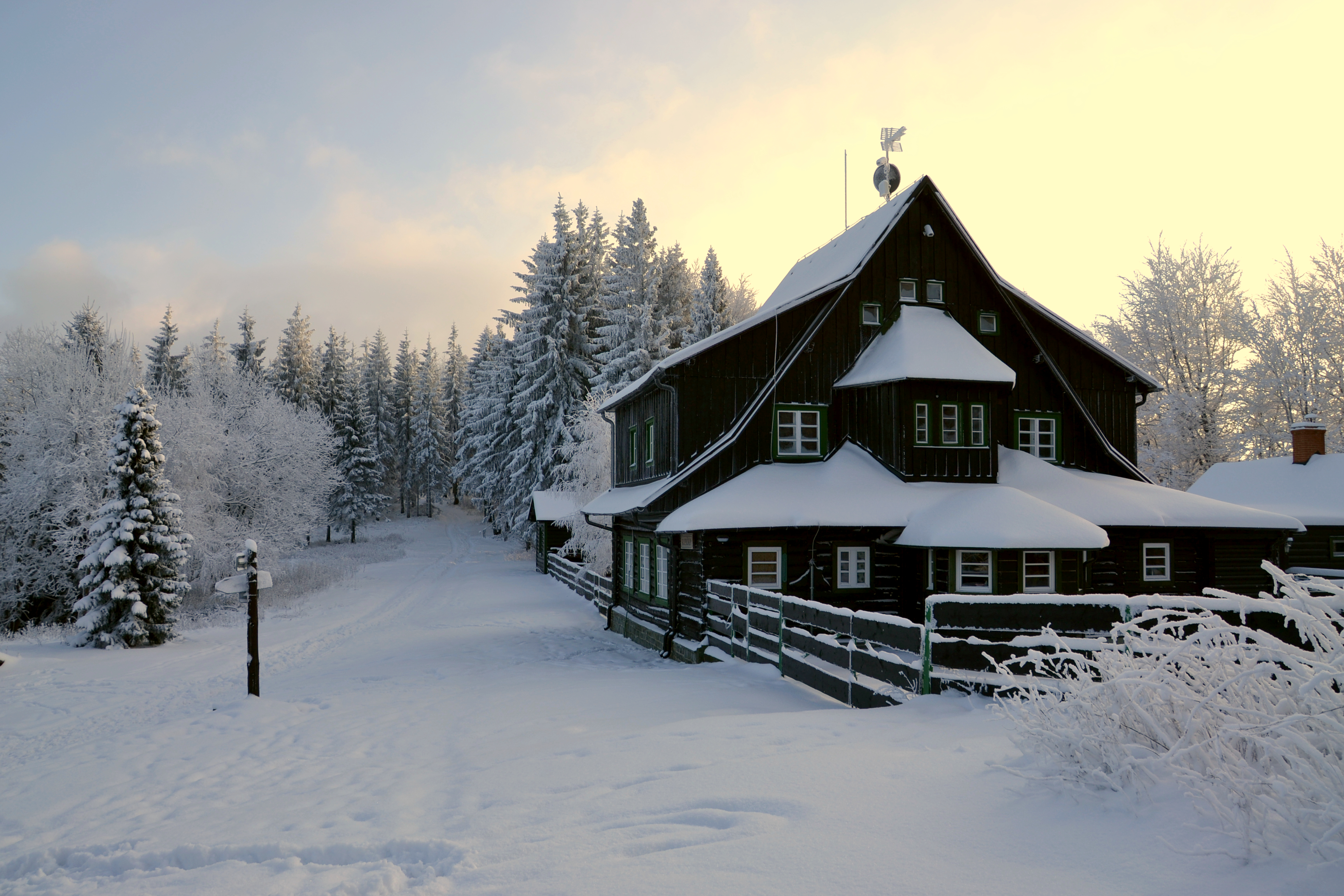 Chata Ropička, Moravskoslezské Beskydy